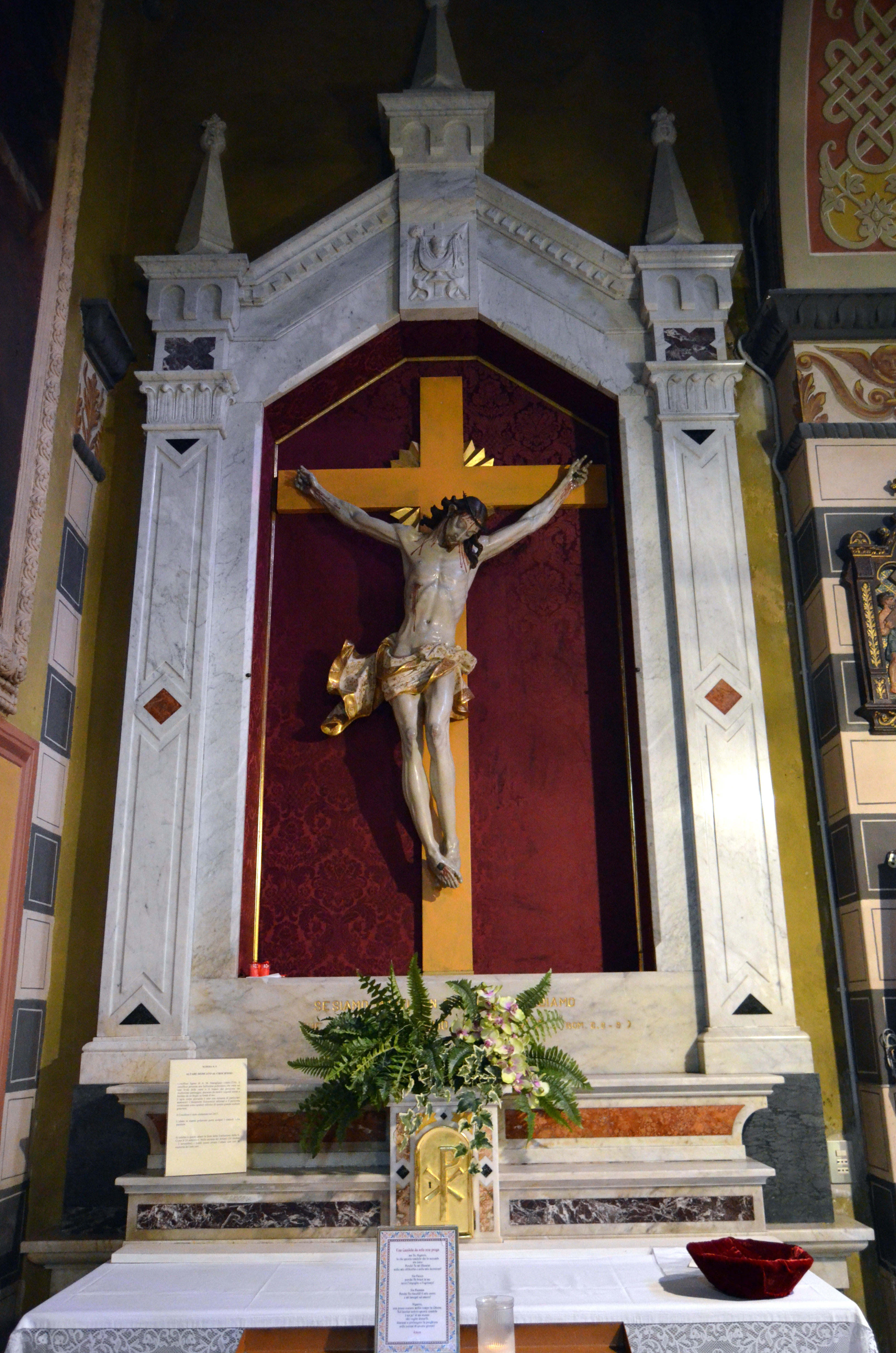 Santuario di Nostra Signora del Ponte, Lavagna, Liguria, Italia